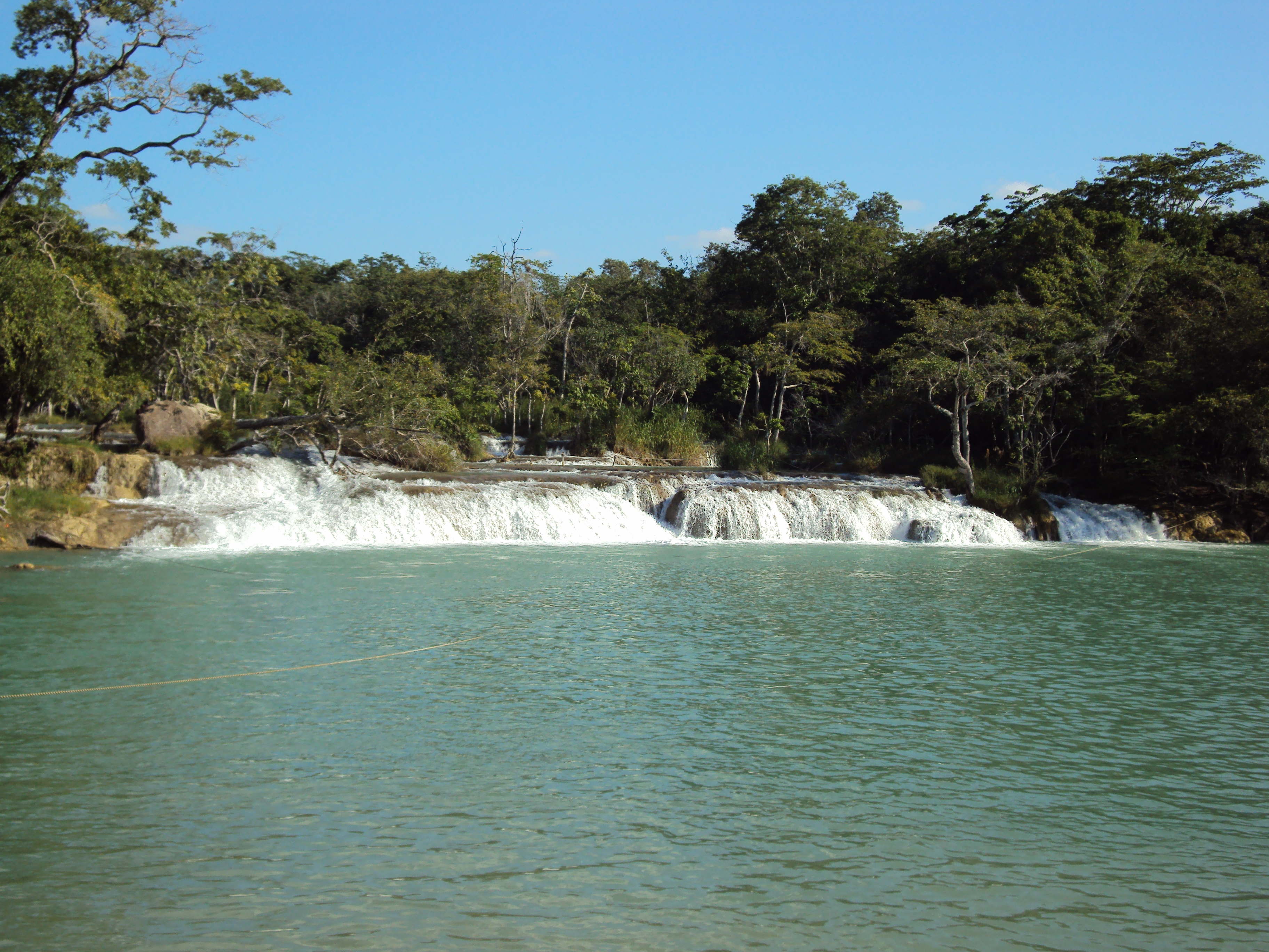 Cascadas de Reforma en el municipio de Balancá, Tabasco, México.